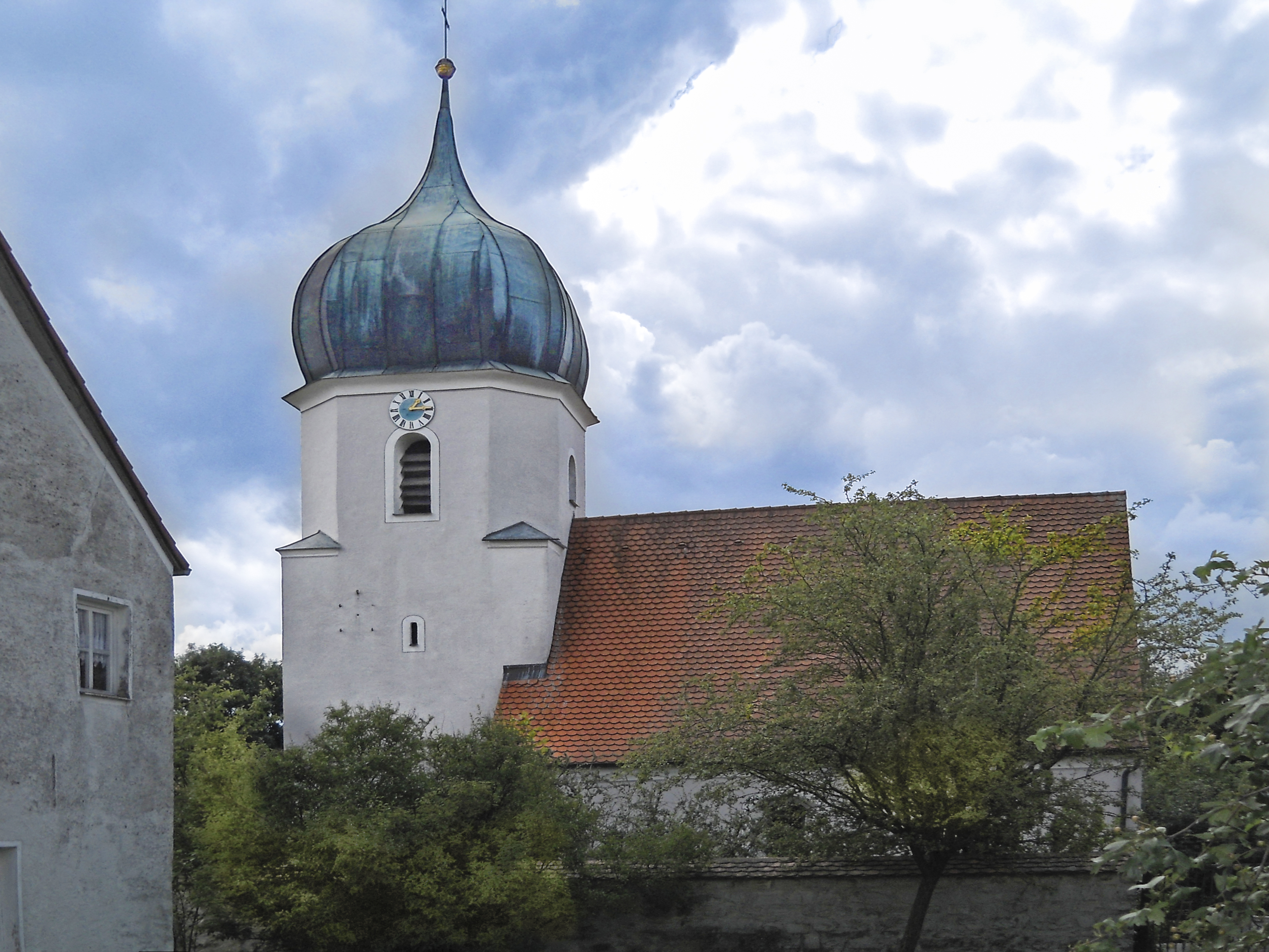 Katholische Kirche von Wallnsdorf, einem Gemeindeteil von Berching im Landkreis Neumarkt in der Oberpfalz